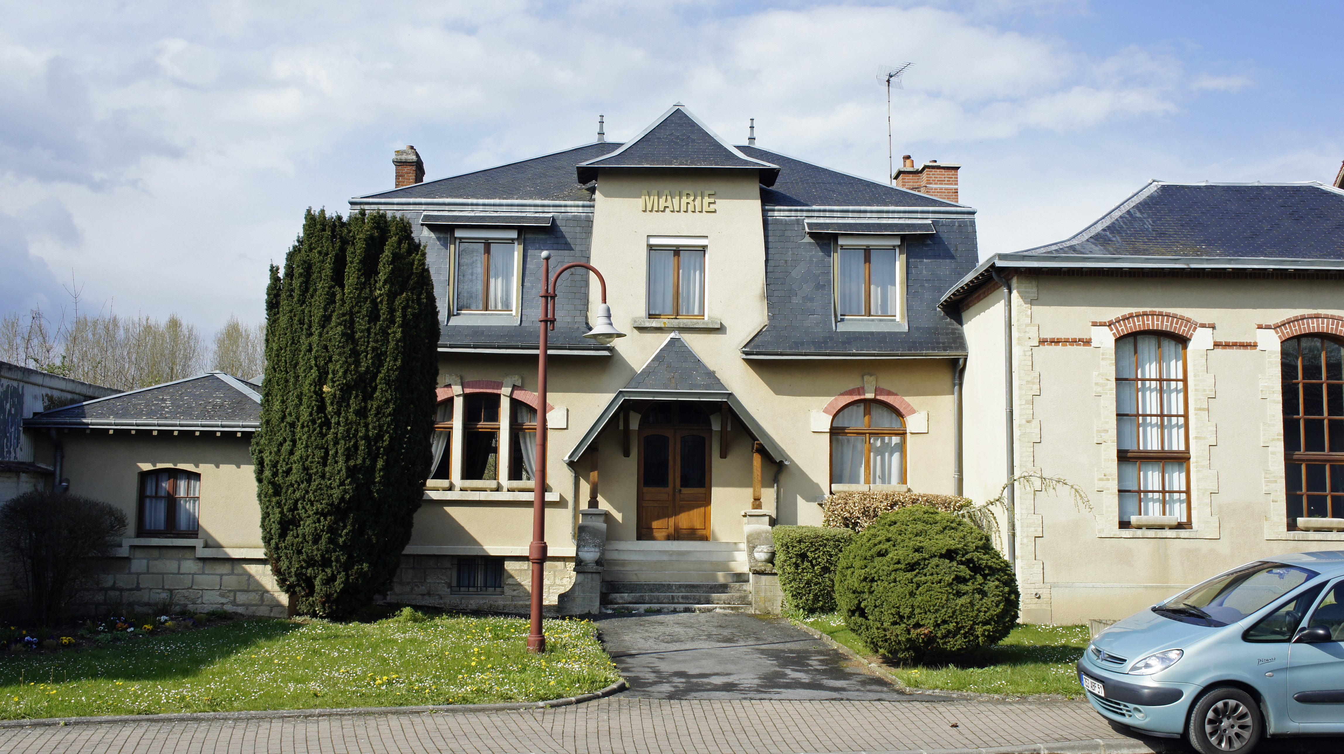 La Mairie de Muizon.